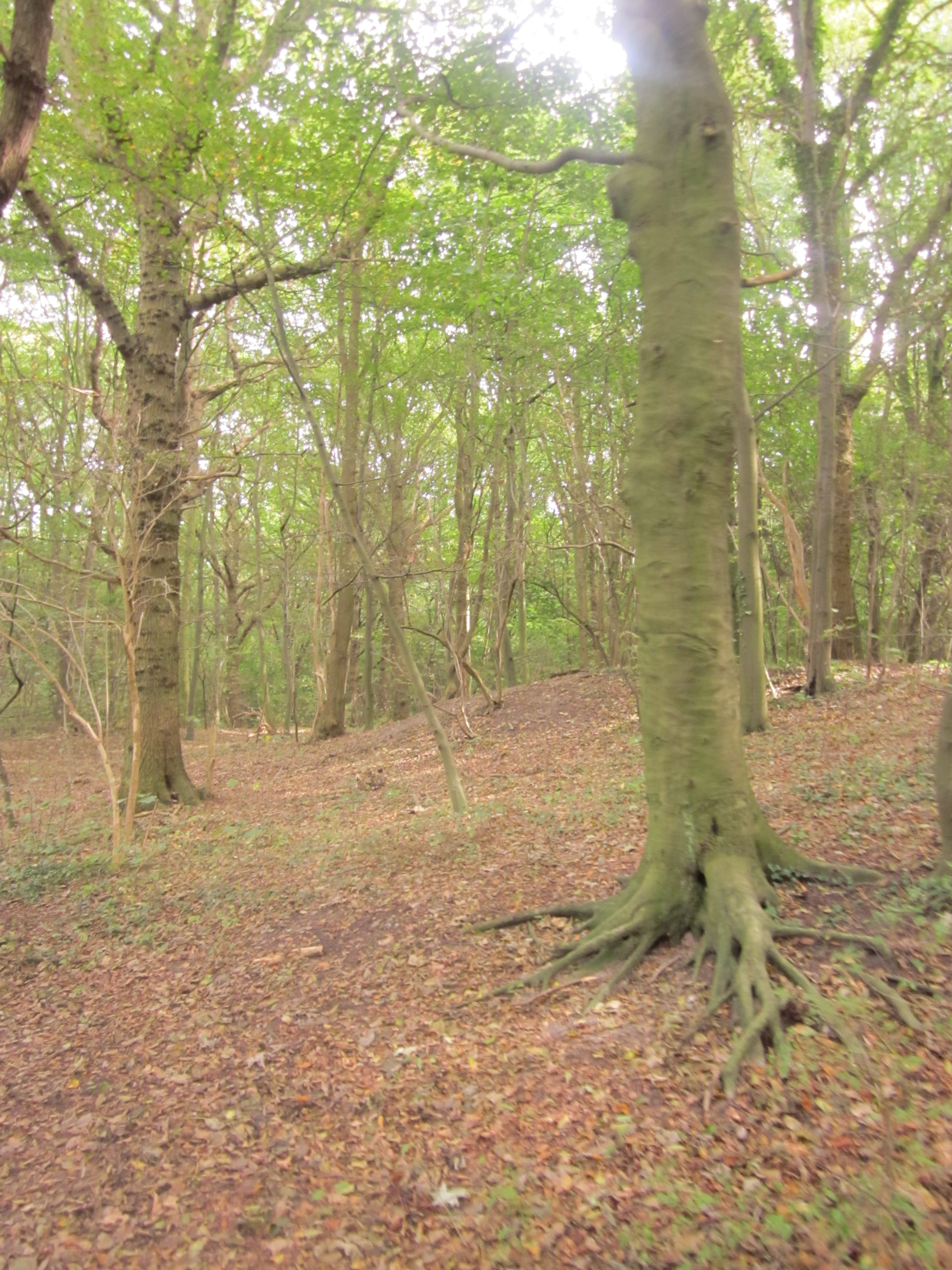 Staelduinse Bos in 's-Gravenzande, Nederland.